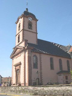 Église de Chatenois-les-Forges (Territoire de Belfort) Photo prise le 20/04/2004 par LP90 Licence GFDL LP90 avril 2004